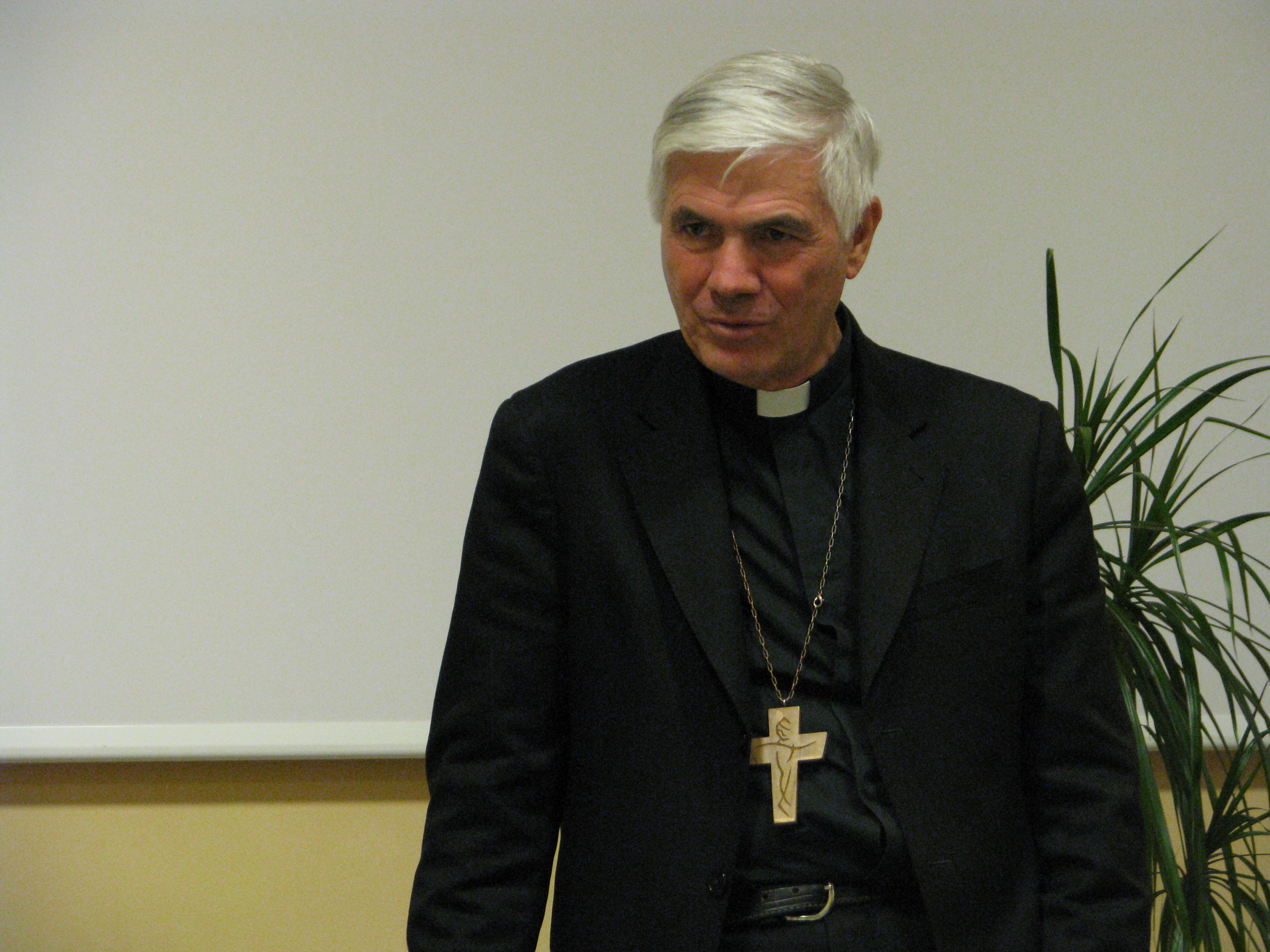 Giovanni D'Ercole. Foto di E.G.